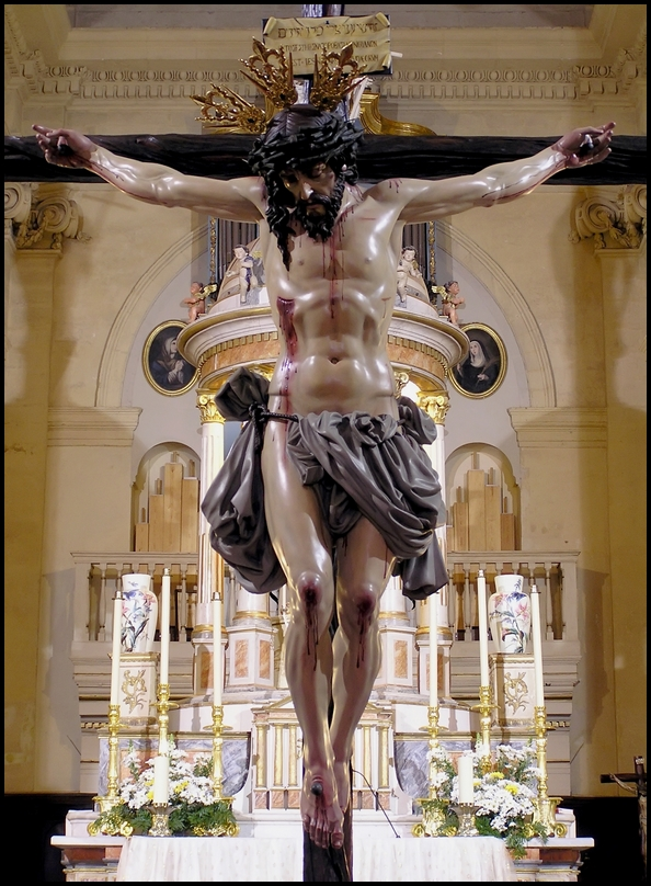 Santo Crucifijo de la Salud de Chiclana